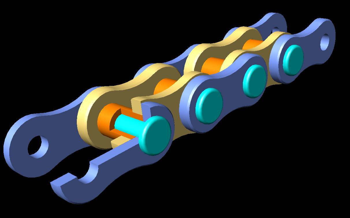 Hüvelyes hajtólánc